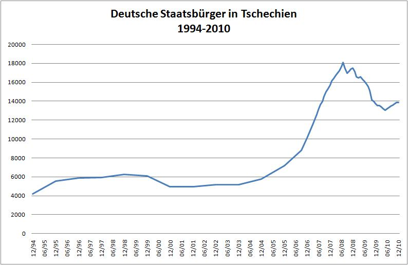 DeutscheinTschechien31072009